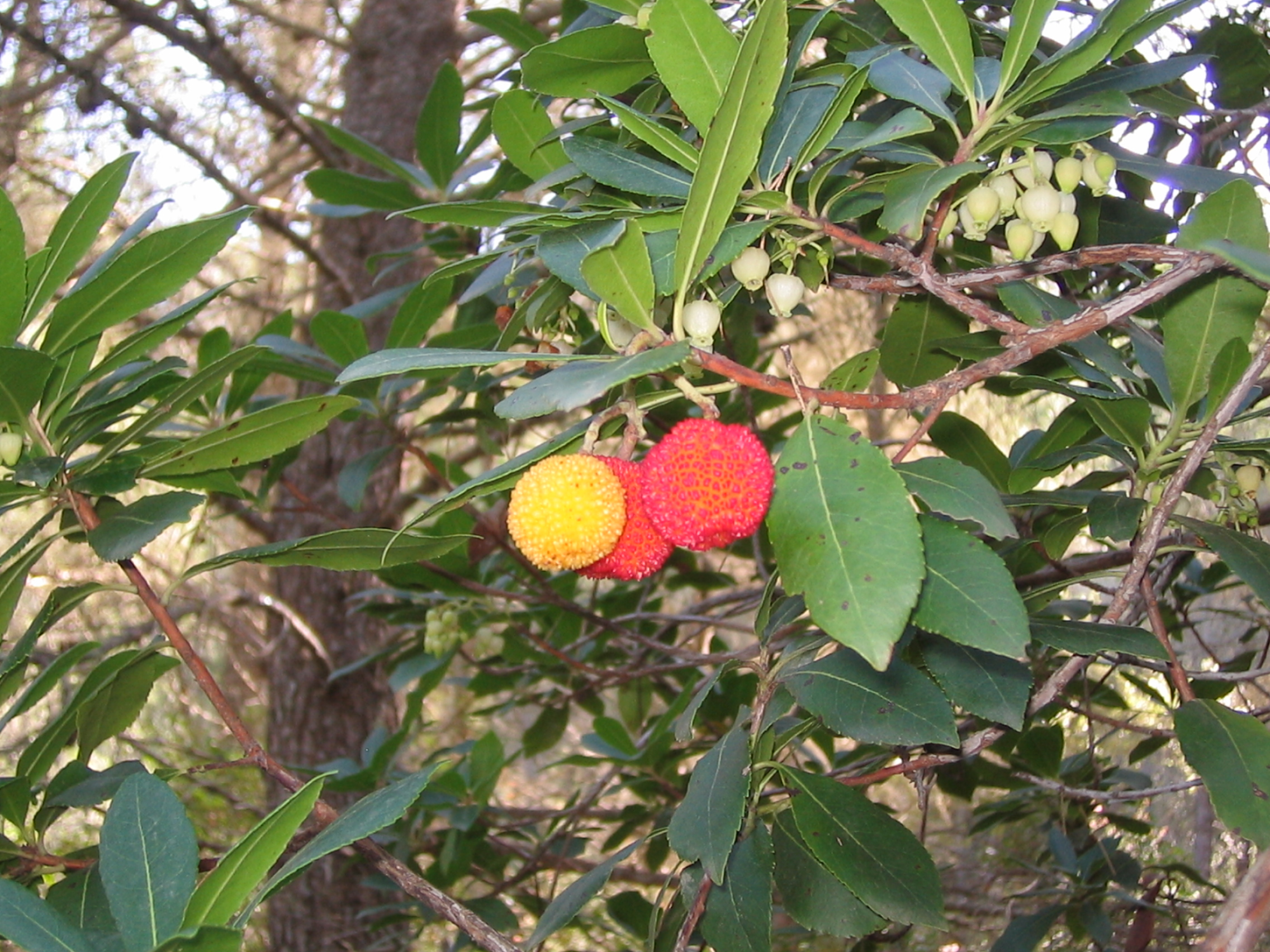 Madroños, Arbutus unedo